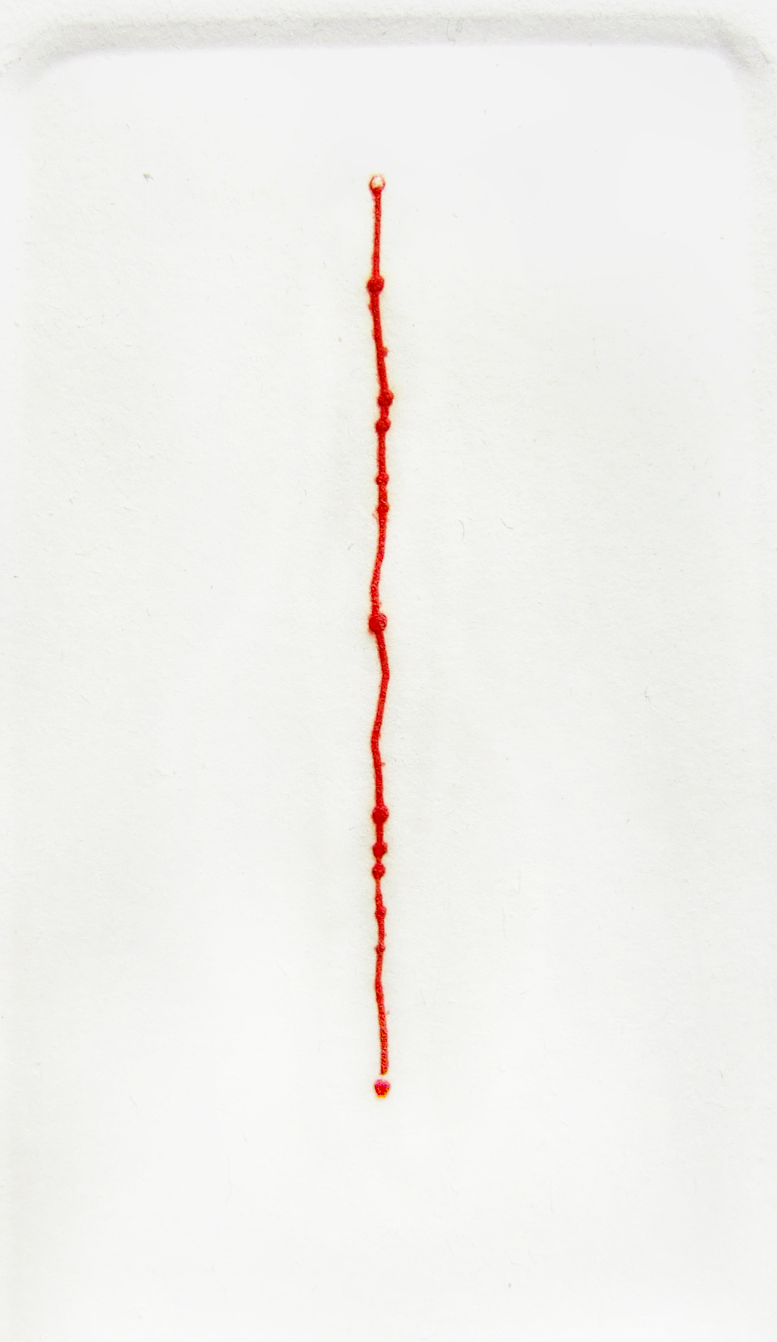 Foglio n° 2 - dalla raccolta incisoria "Respira" (Breathe) 1982